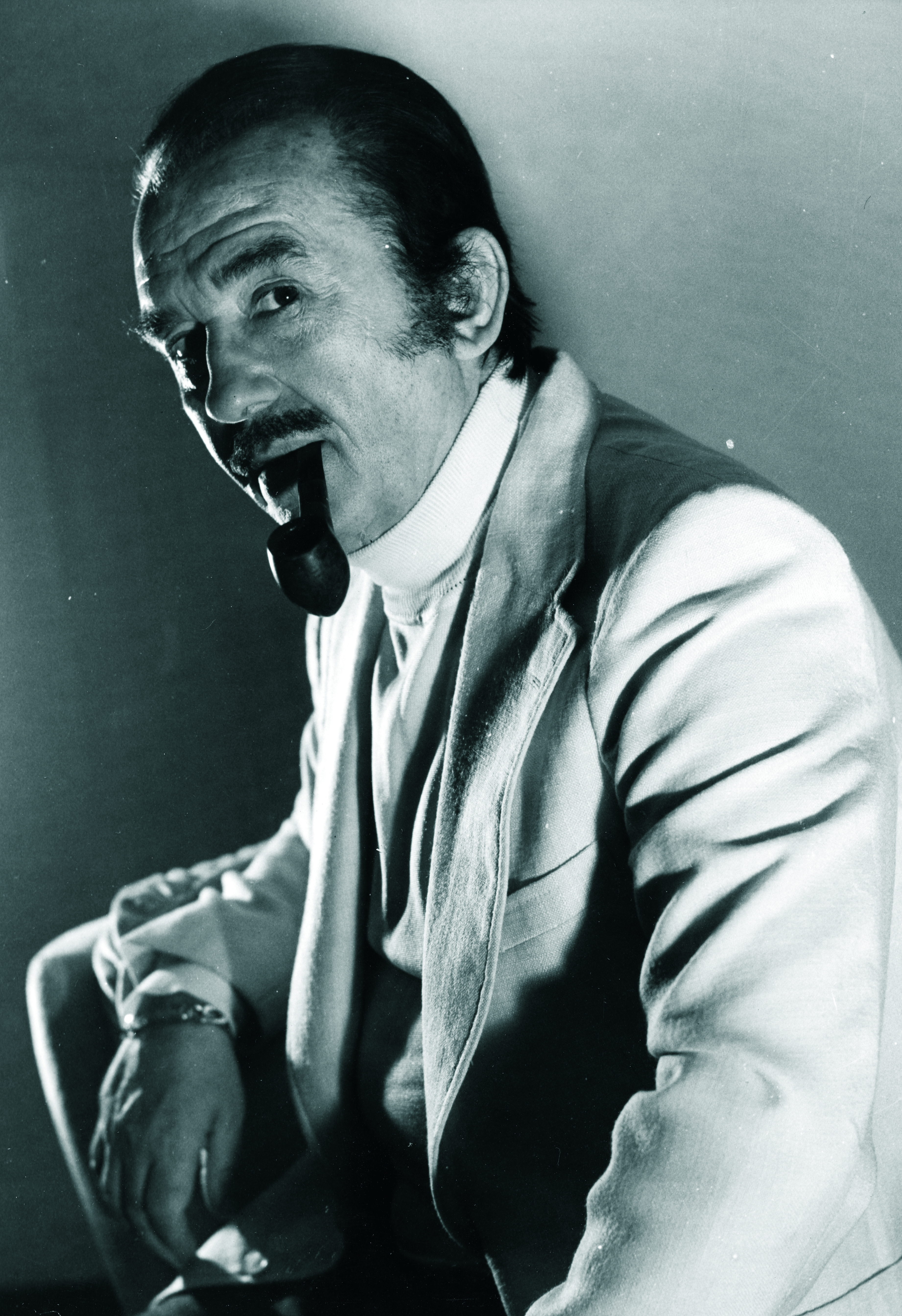 Fotografia de Bonet de San Pedro